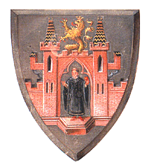 Münchner Wappen 1865 (Groß)